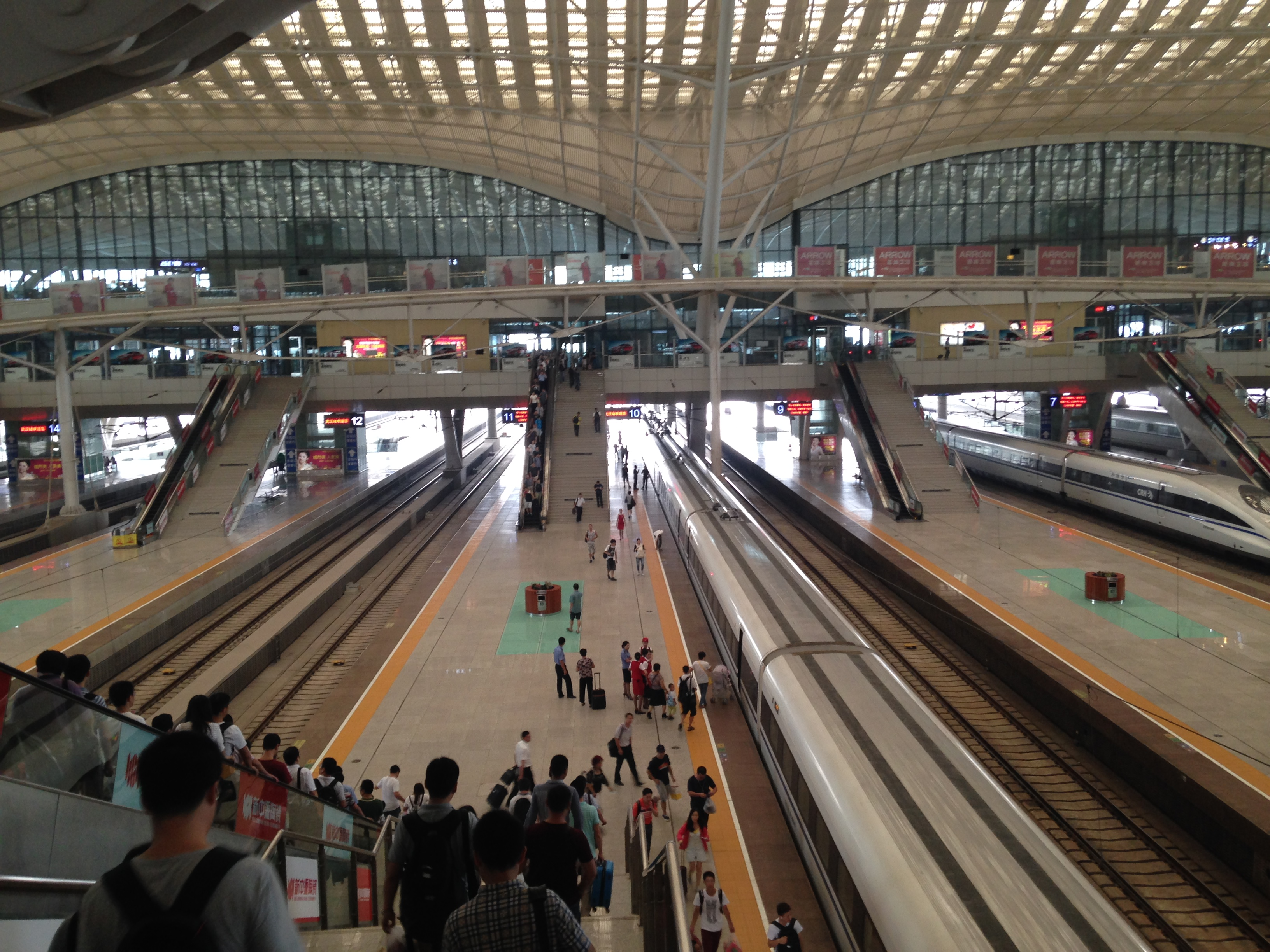 武漢駅のホーム